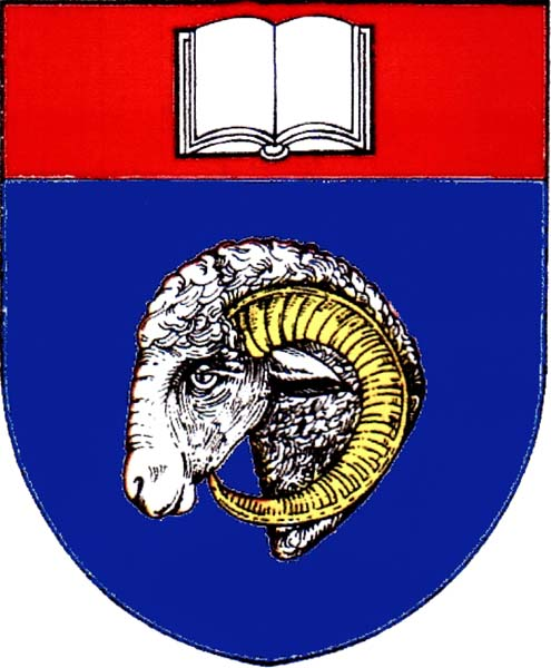 Znak obce Velký Beranov